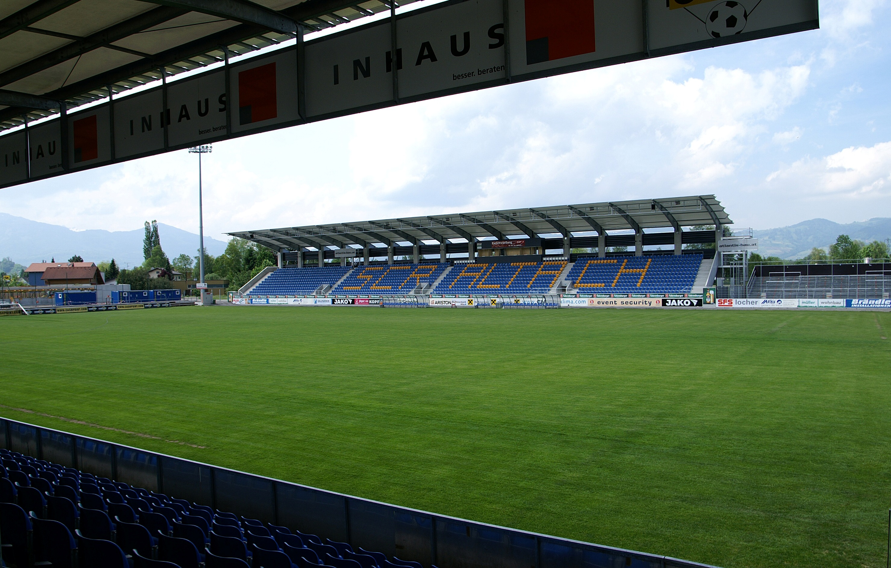 Die Cashpoint-Arena ist ein 8.500 Zuschauer fassendes Fußballstadion in Altach, im österreichischen Bundesland Vorarlberg.